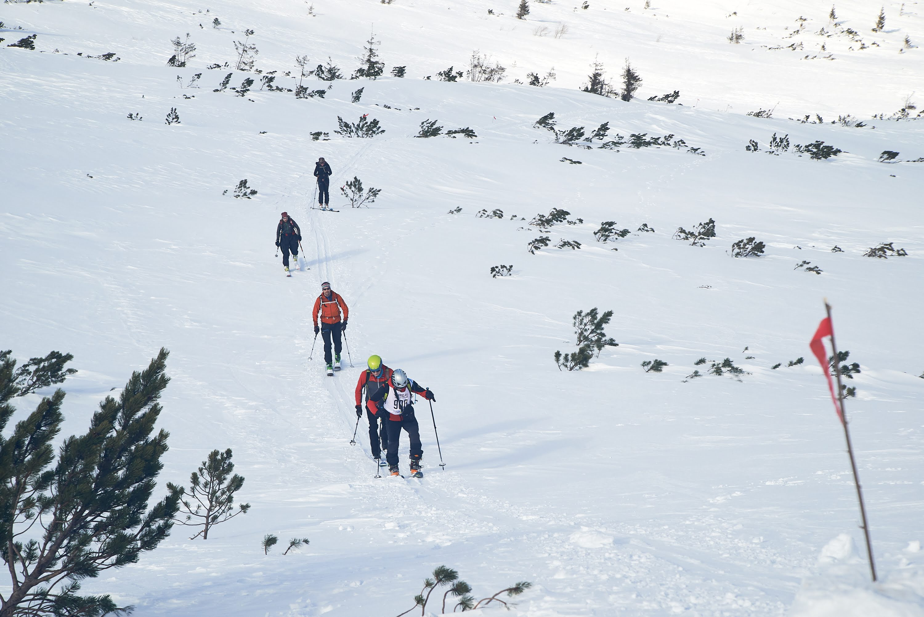 Учасники Кубку Білого Слона долають підйом